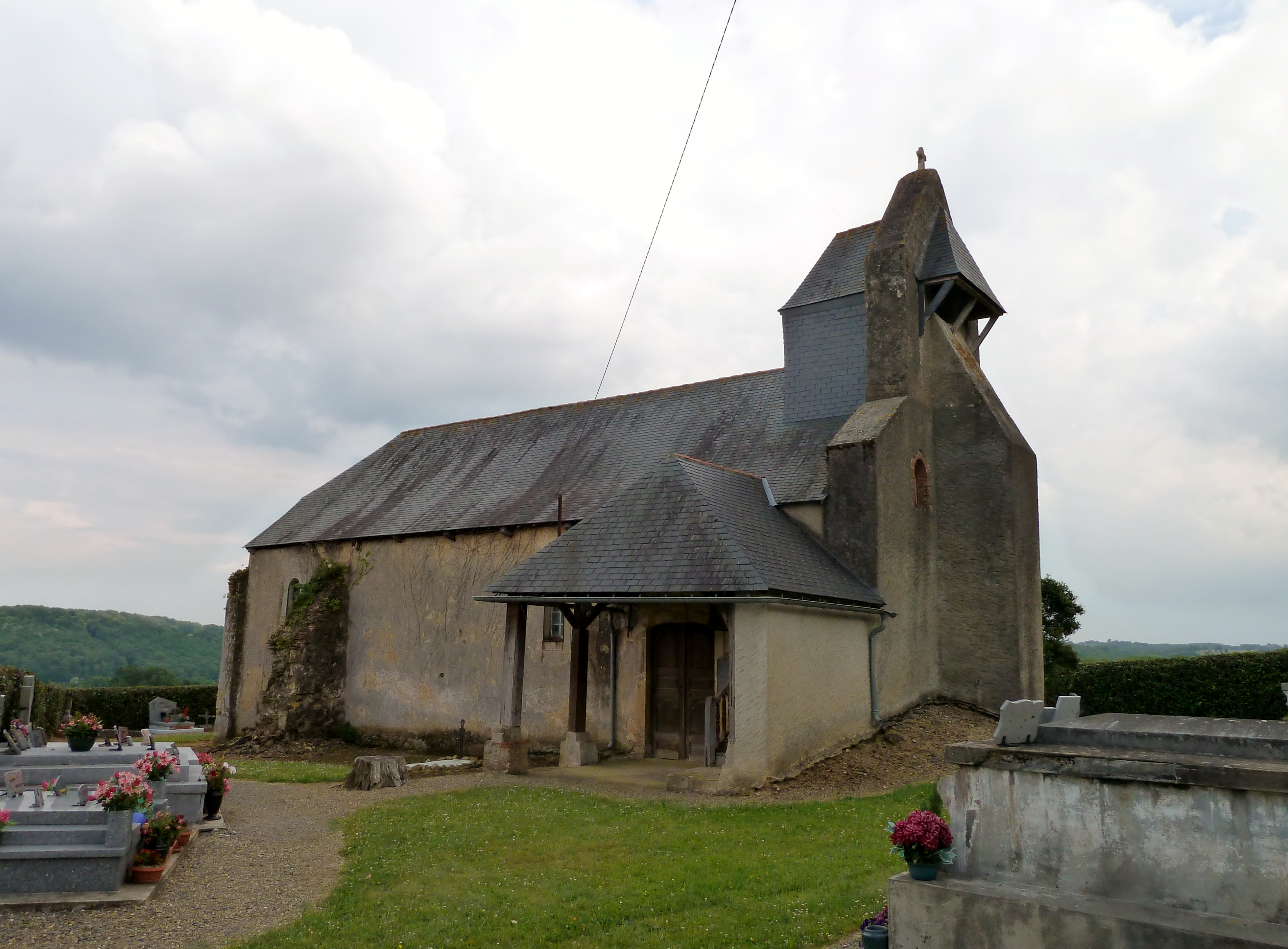 Église de Bassillon-Vauzé